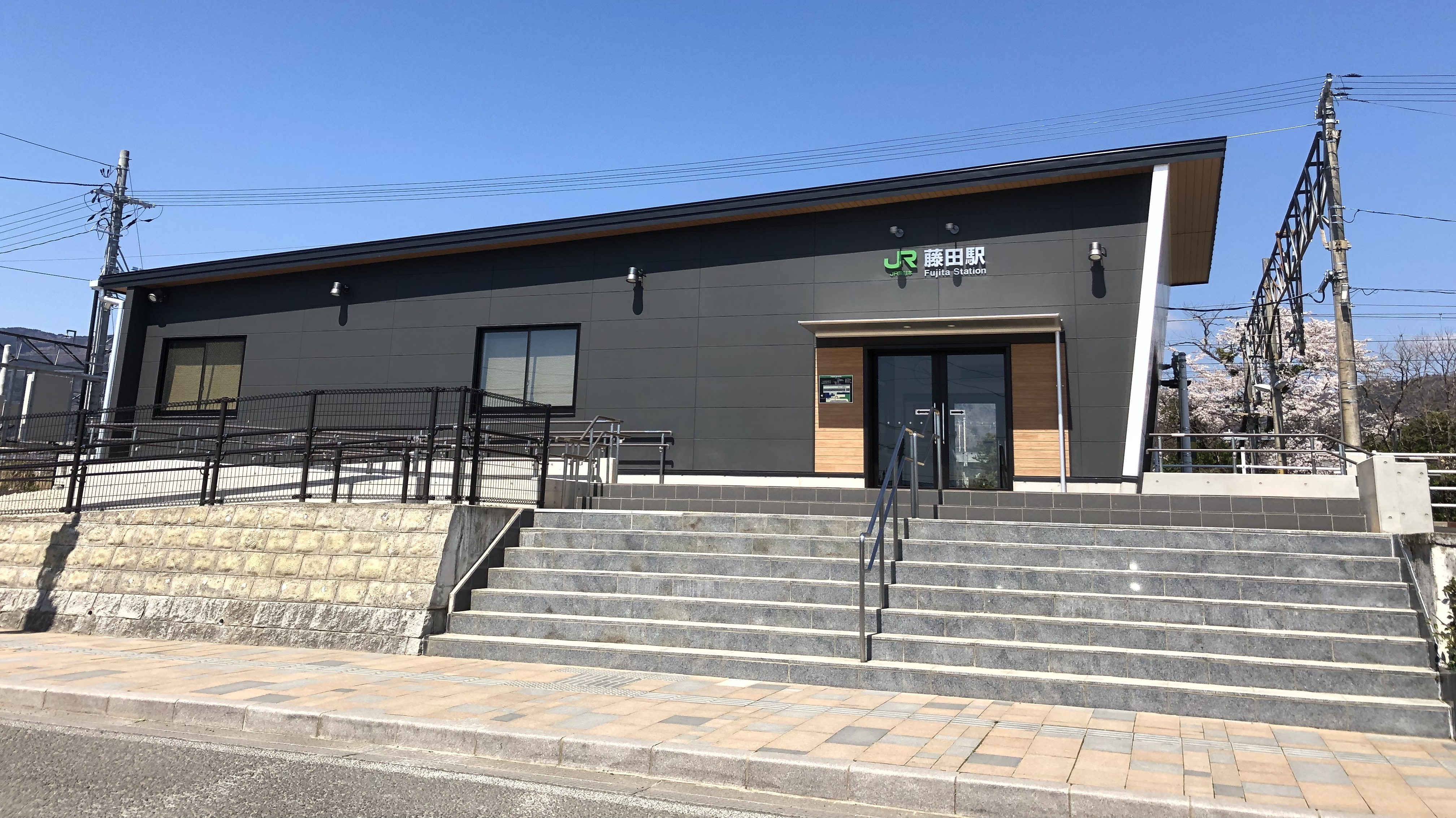 2019年3月に建て替えられたJR東日本の藤田駅駅舎